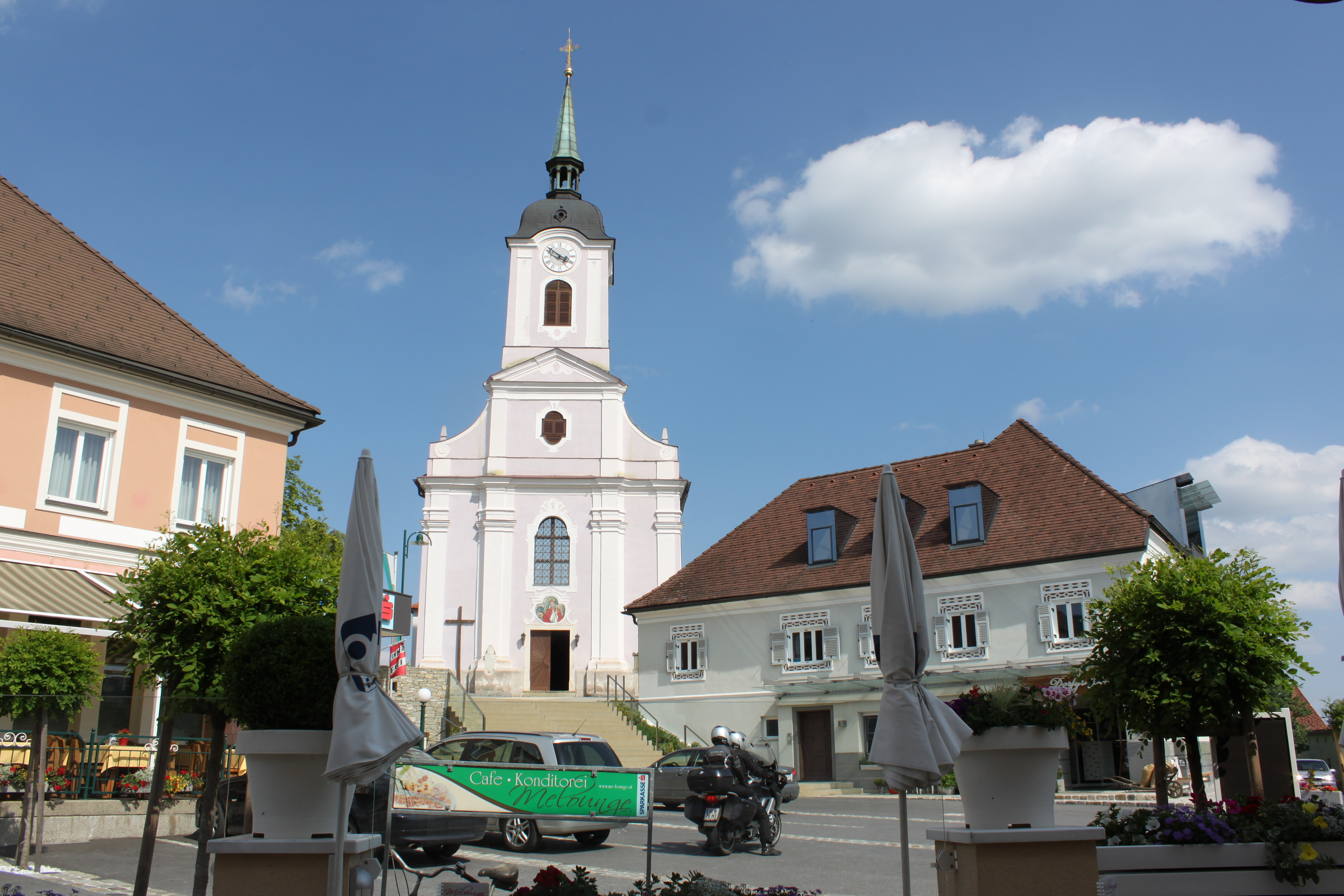 Kath. Pfarrkirche hl. Nikolaus